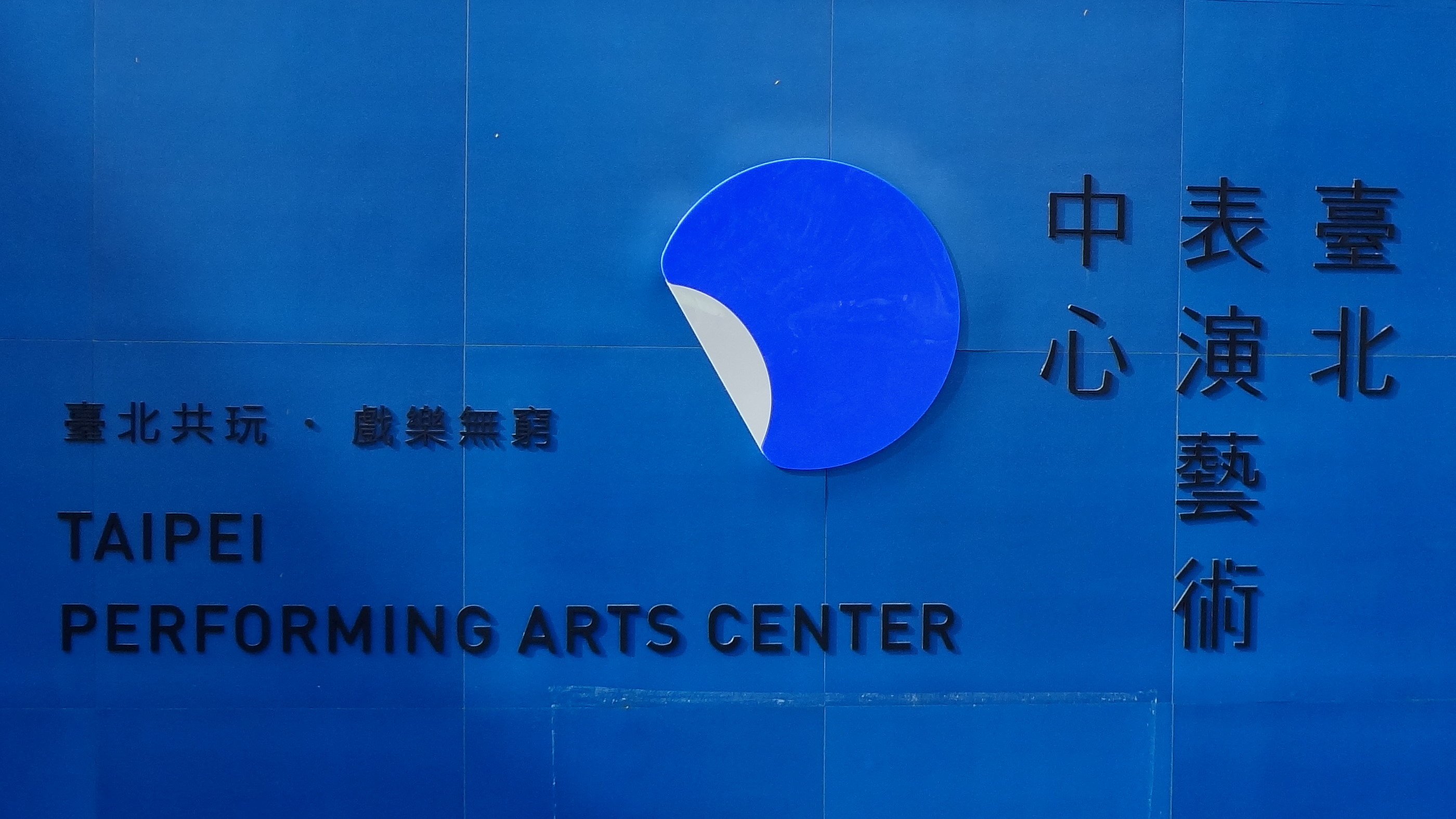 中文（台灣）: 臺北市花博公園短期展示的臺北表演藝術中心標誌牌。